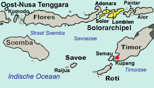 Zelfgemaakte kaart